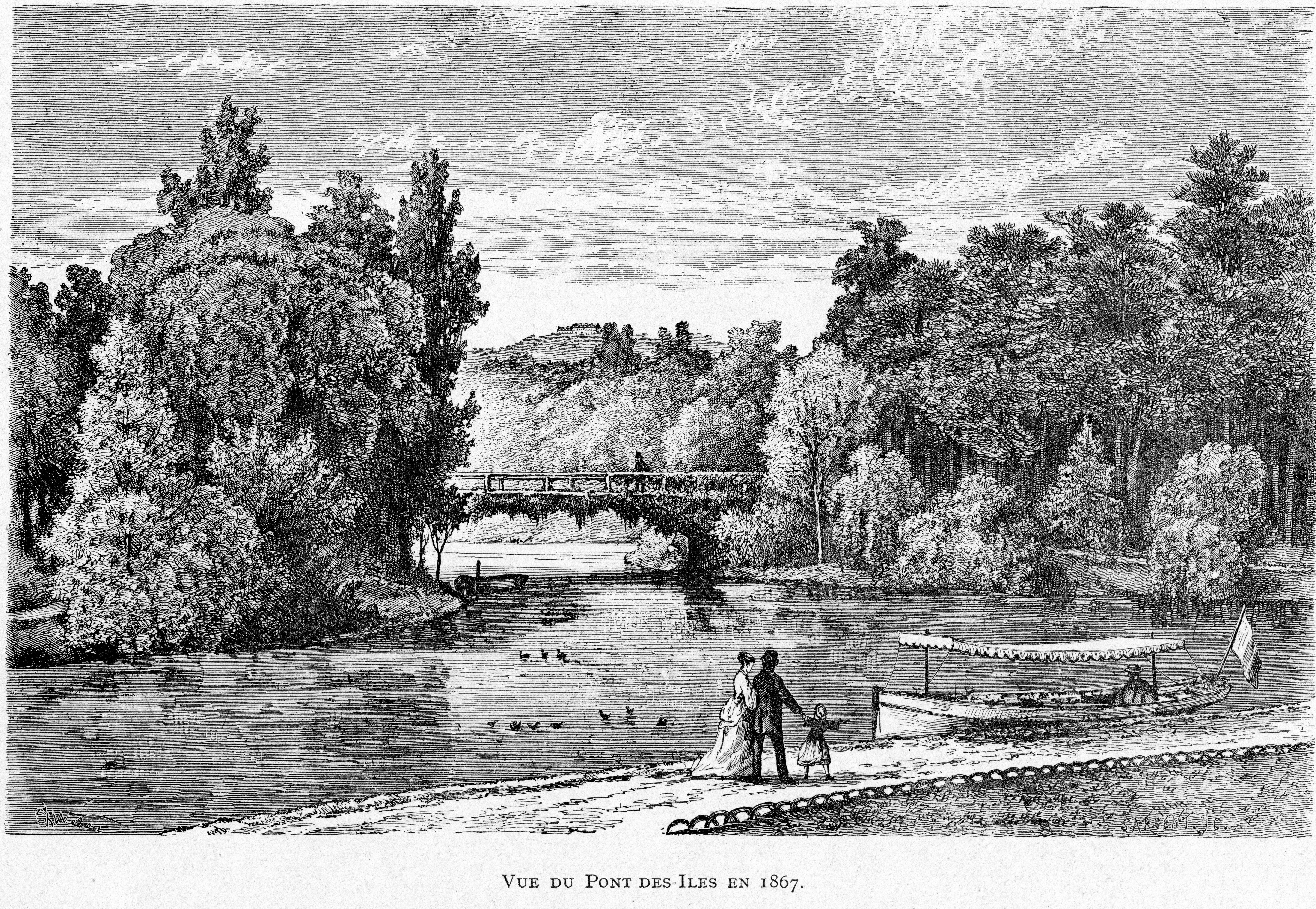 Corbel026 Vue du Pont des Îles en 1867 (Bois de Boulogne)